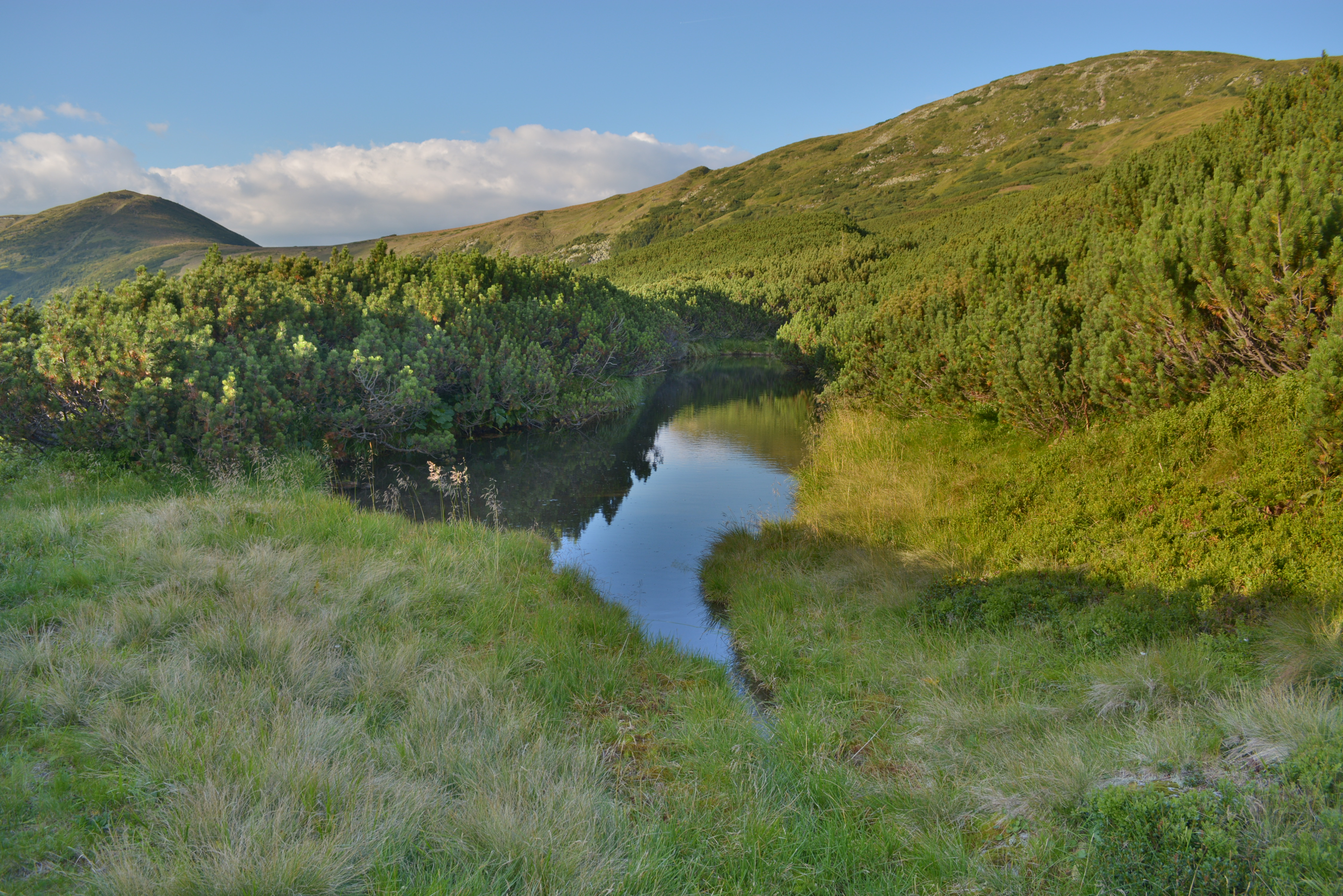 Загальний вид з півдня на озеро Верхнє Озірне. З цього боку в нього впадає і витікає струмок